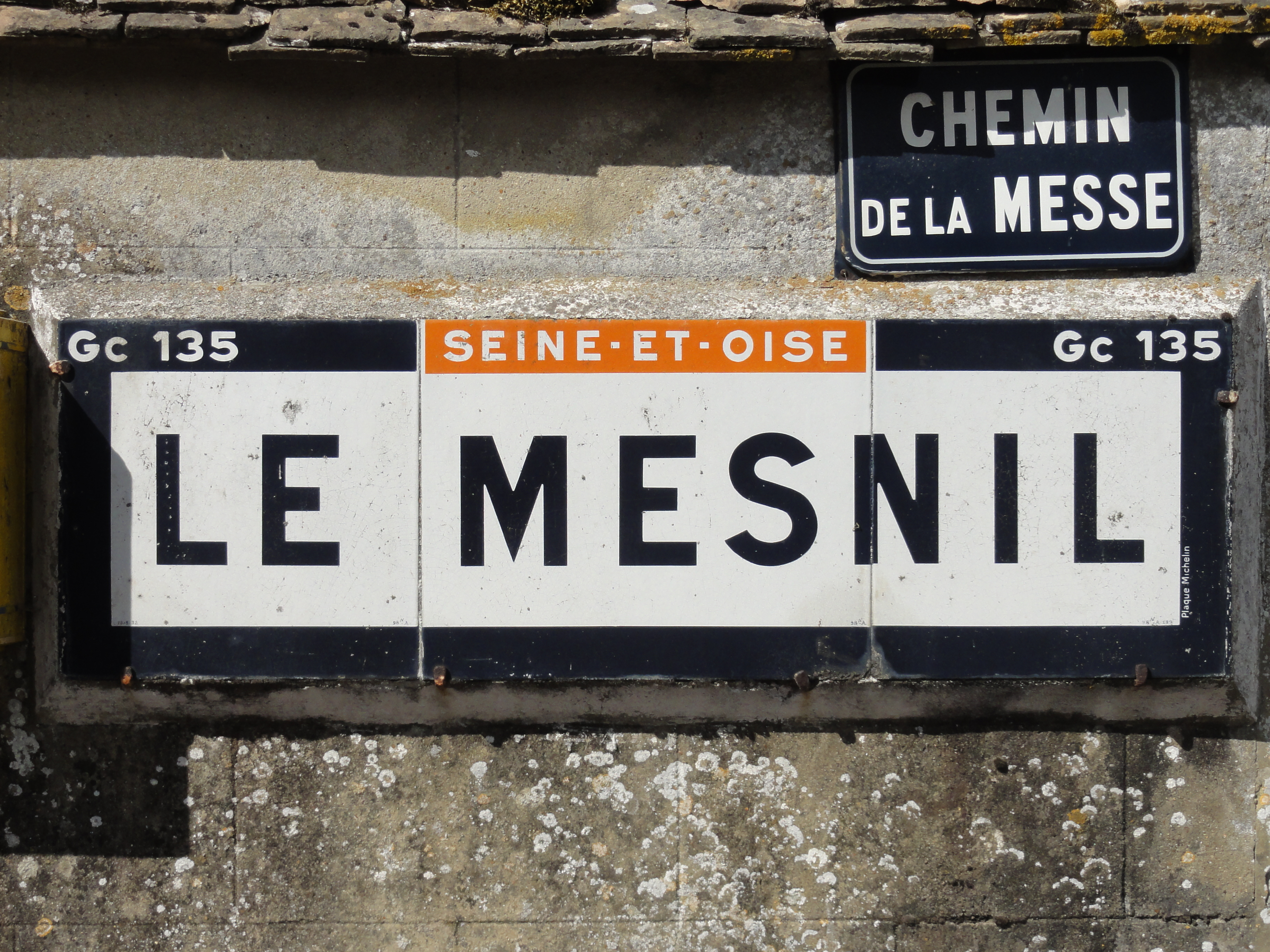 Commune d'Omerville (voir titre).